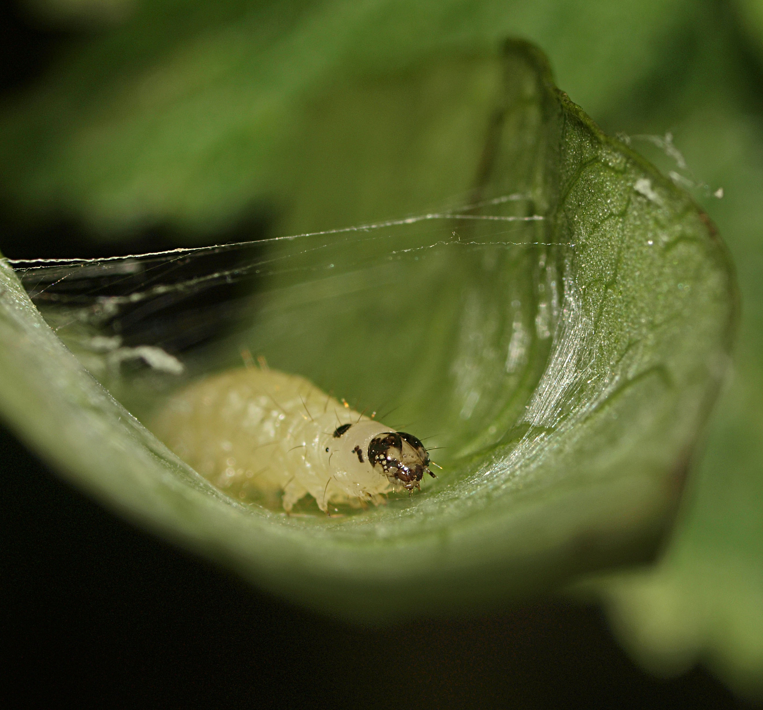 Larva close to moulting. The new black stemmata (eyes) can already be seen behind the old head capsule. Nældehalvmøl larve tæt på et hudskifte. De nye sorte øjne kan allerede ses bag den gamle hovedskal.